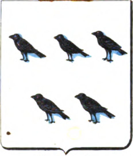 D'argent, chargé de cinq pinçons de sable, trois en chef en deux en pointe.